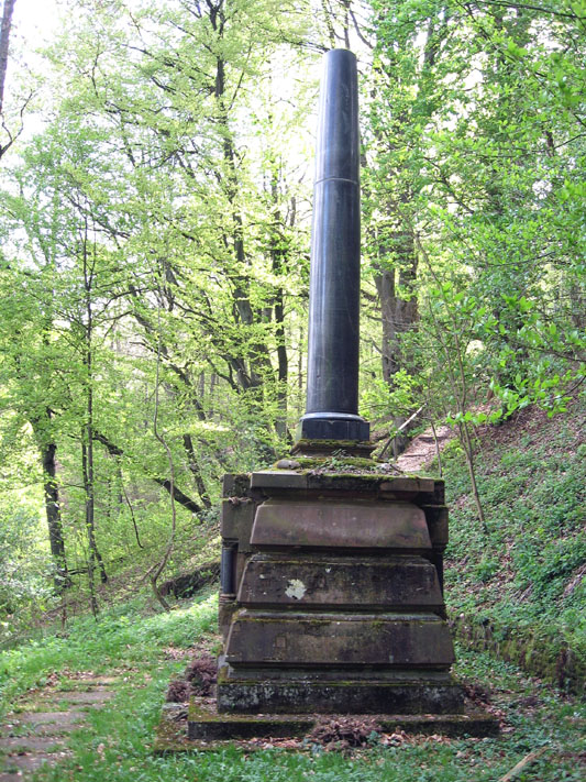 Ehrenmal für das 2. Brandenburgische Grenadier-Regiment Nr. 12 „Prinz Carl von Preussen“ der 5. Division der neupreußischen Armee in Spicheren